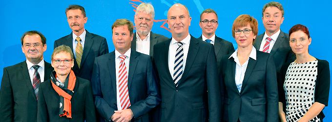 Landesregieung Brandenburg